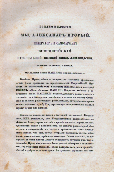 Manifest 19.02.2010